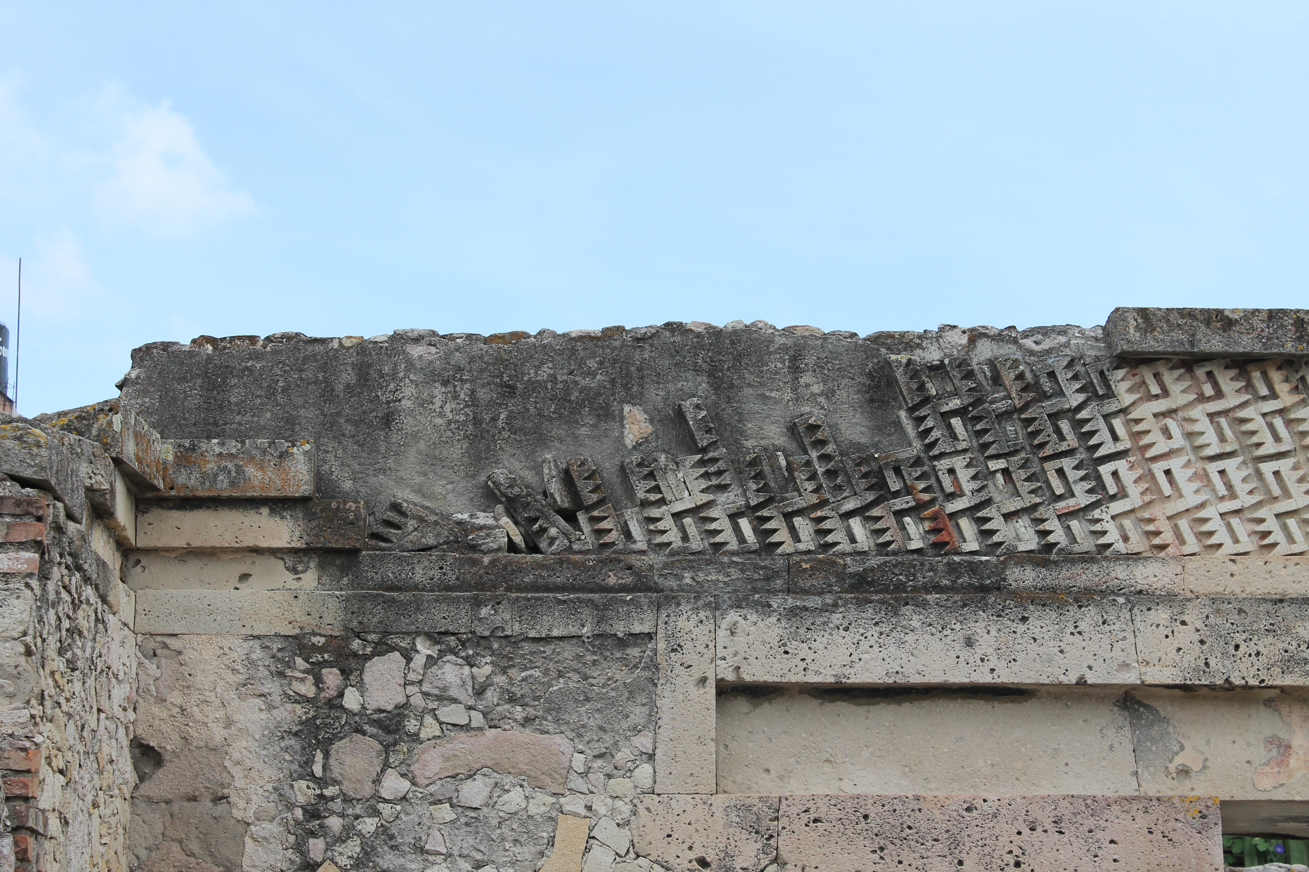 En la imagen se aprecia la parte superior de uno de los muros ubicados en el Grupo norte, esta imagen muestra cómo estaban incrustados y ensamblados los grupos de grecas en las partes superiores de los muros.